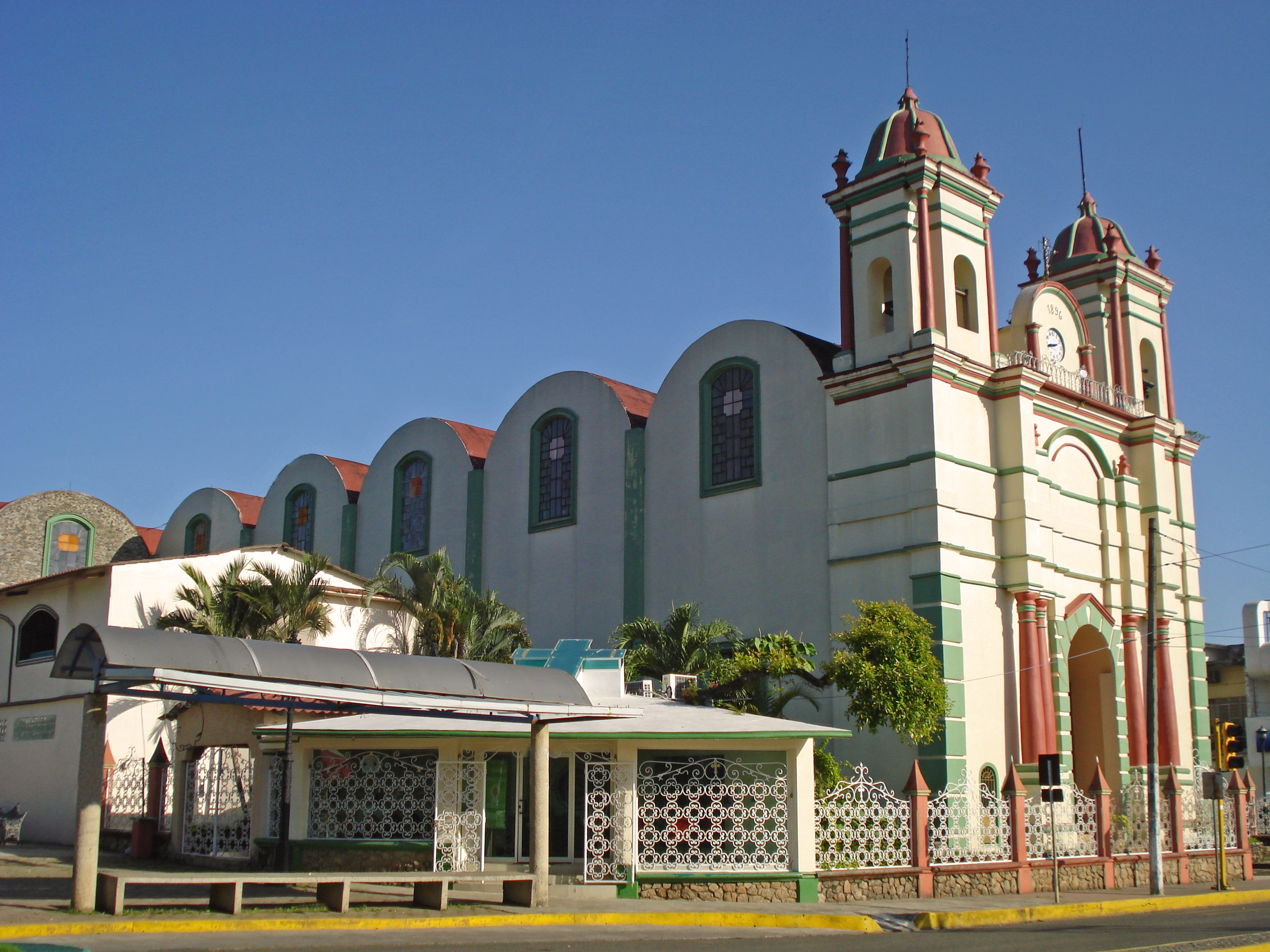 Templo de Santiago Apóstol